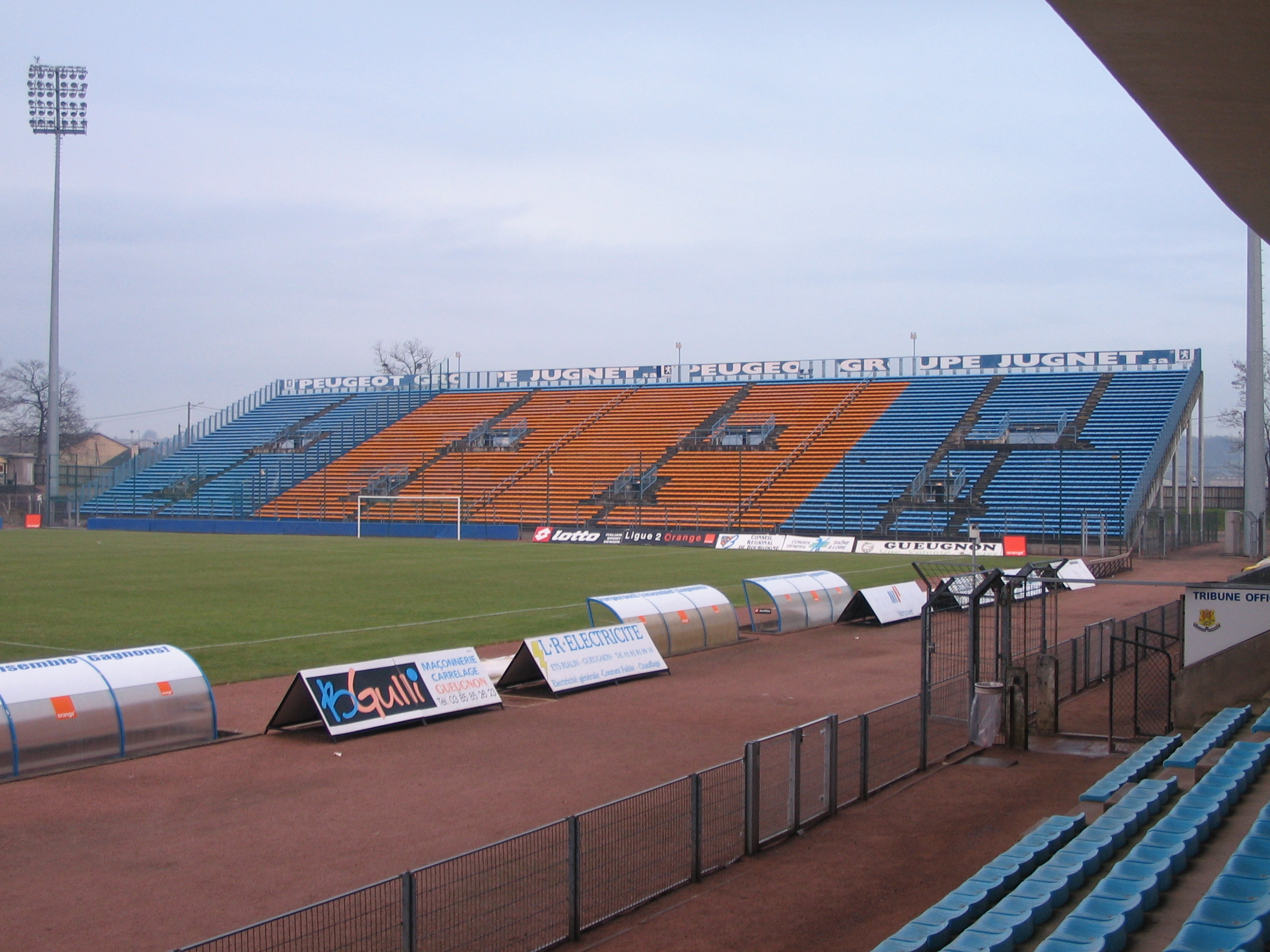 Stade Jean Laville, Gueugnon (71) - tribune est en 2006.